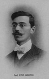 Ezio Marchi's portrait